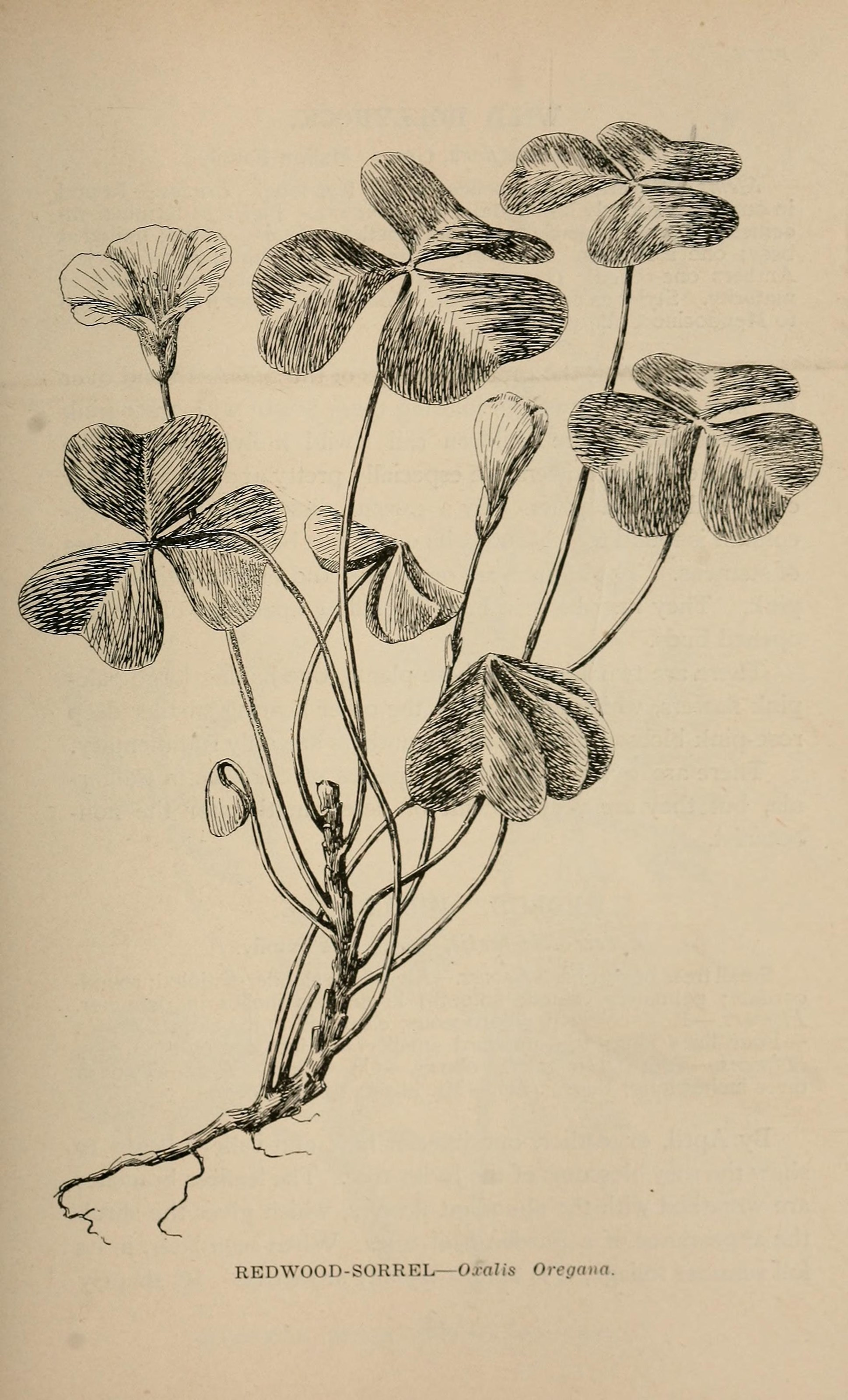 REDWOOD-SOKKKL OxaltS Or